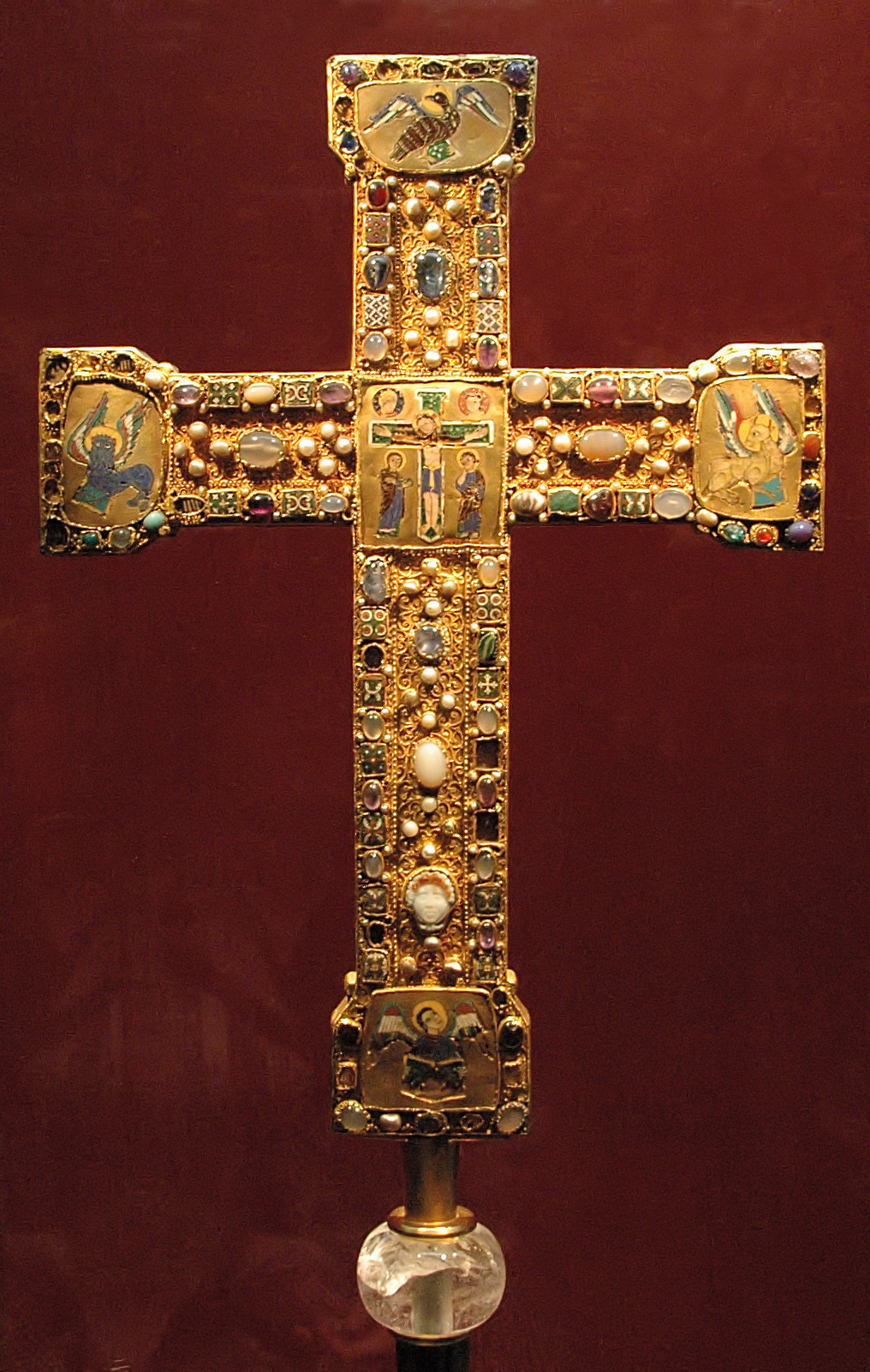 Das Vortragekreuz mit den großen Senkschmelzen aus dem Essener Domschatz